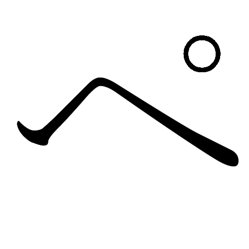 Japanese Katakana "Pe"